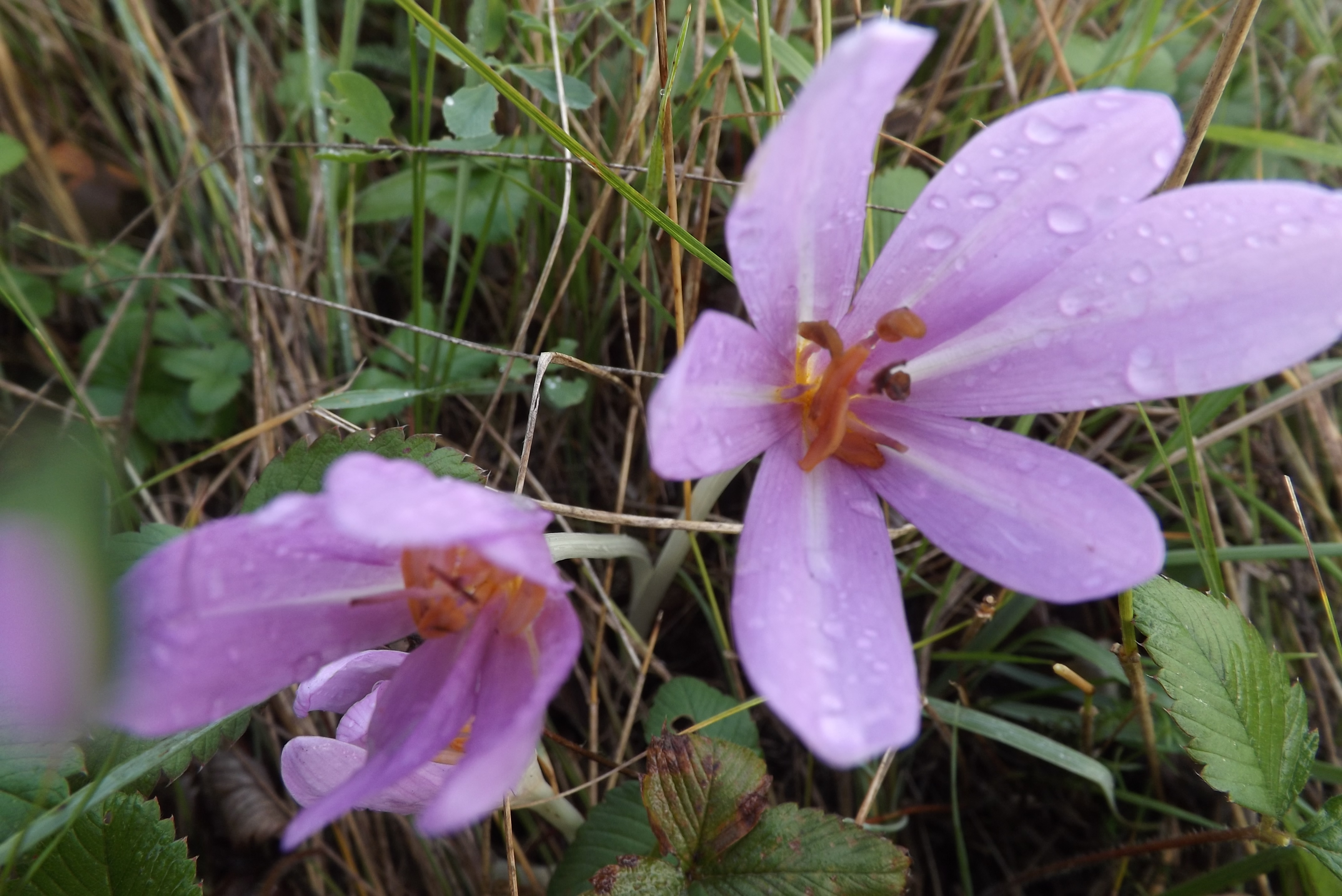 Őszi kikerics Latorhegyen, Sály